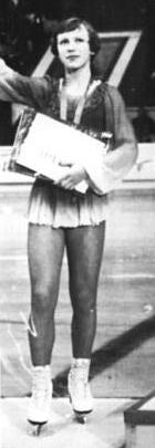 Carola Weissenberg, Kira Iwanowa, Marina Ignatowa PI-Tass-11.12.78 Moskau: Mit einem Schaulaufen ging am 11.12.78 der Eiskunstlaufwettbewerb um den Preis der Zeitung Nouvelles de Moscou zu Ende. Die 15jährige Berlinerin Carola Weissenberg errang den 1. Platz. Sie hatte den Grundstein zum Sieg bereits durch eine ausgezeichnete Pflicht gelegt, danach aber auch in der Kür eine überzeugende Leistung gezeigt. Platz 2 belegte Kira Iwanowa (UdSSR), Platz 3 Marina Ignatowa (UdSSR).